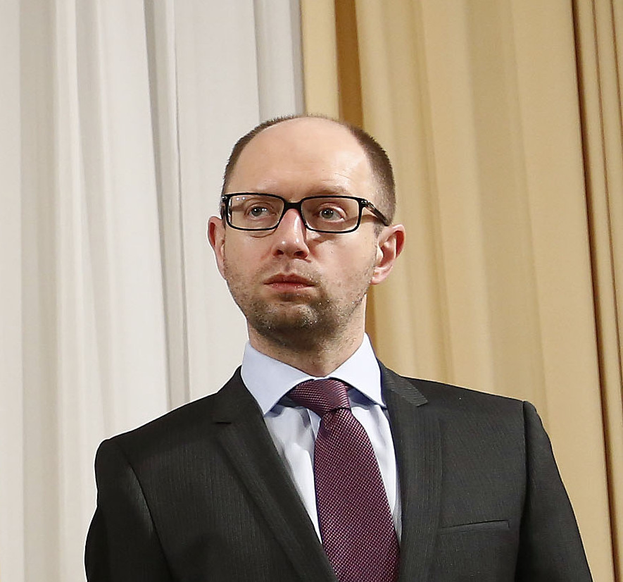 Außenminister Sebastian Kurz trifft im Rahmen seines Arbeitsbesuches gemeinsam mit Generalsekretär Thorbjorn Jagland mit dem ukrainischen Präsidenten, Alexander Turtschinow und Ministerpräsident Arsenij Jazenjuk, zusammen. Kiev, 10.03.2014, Foto: Dragan Tatic